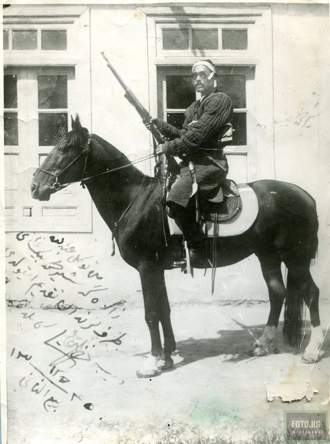 Шир Мухаммед-бек Гази, широко распространенное прозвище Курширмат (1895, Гарбаба, Ферганская область — 10 марта 1970) — видный деятель басмаческого движения, с 1923 года в эмиграции.